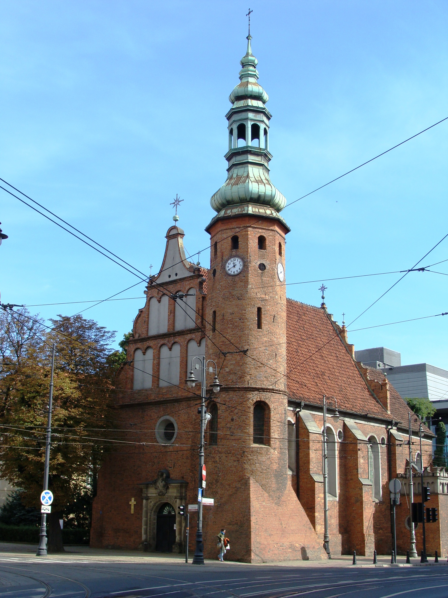 Bydgoszcz, kościół klasztorny klarysek, ob. par. p.w. Matki Boskiej Wniebowziętej, 1582